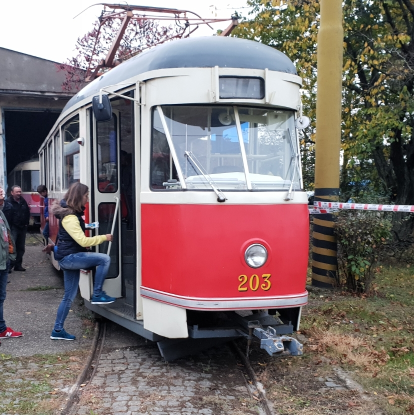 Tatra T1 v Košickej vozovni.